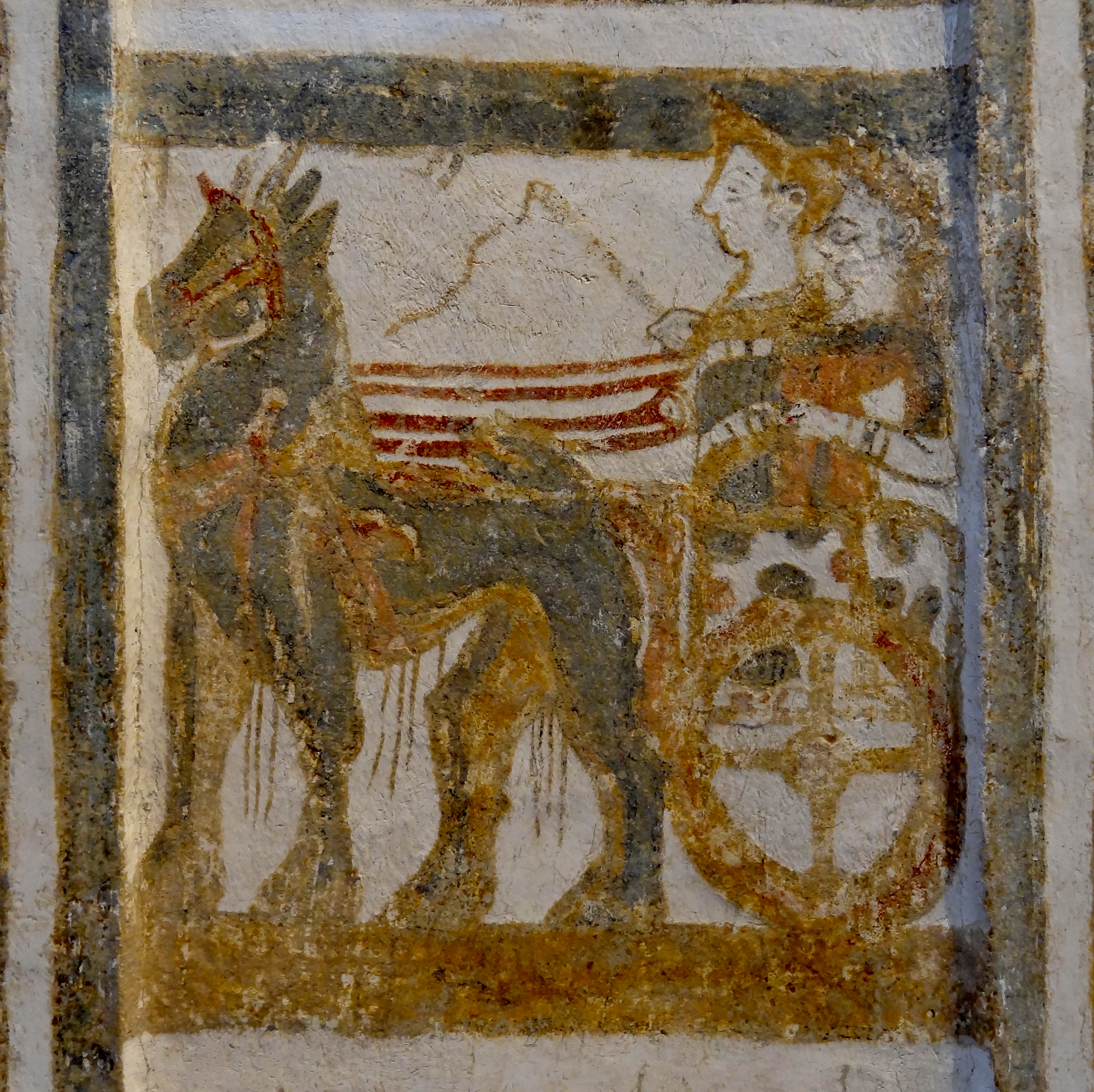 Sarkophag von Agia Triada (14. Jahrhundert v. Chr.), ausgestellt im Archäologischen Museum Iraklio, Kreta, Griechenland